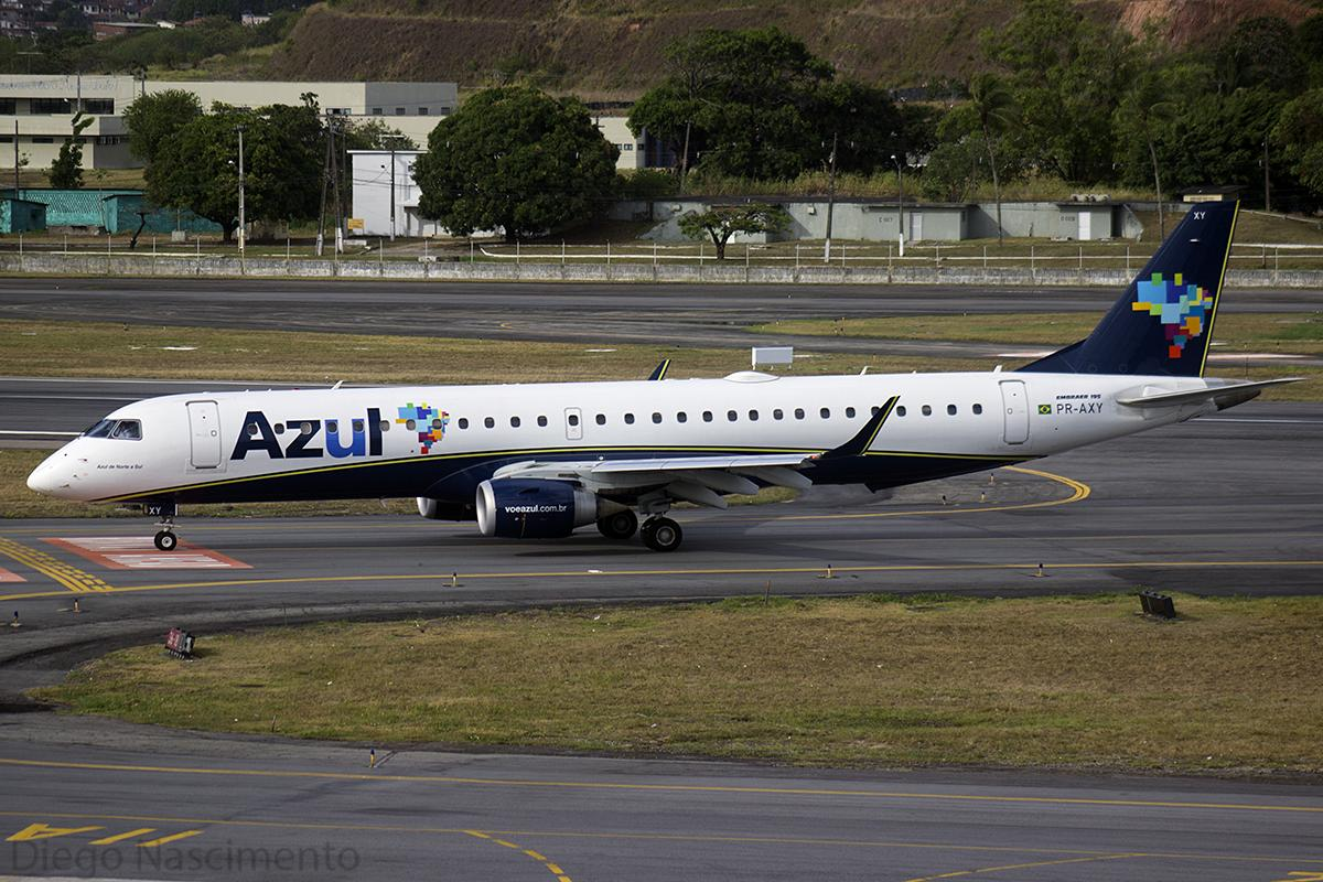 PR-AXY AZUL Linhas Aéreas Brasileiras Embraer ERJ-195AR (ERJ-190-200 IGW) - cn 19000648